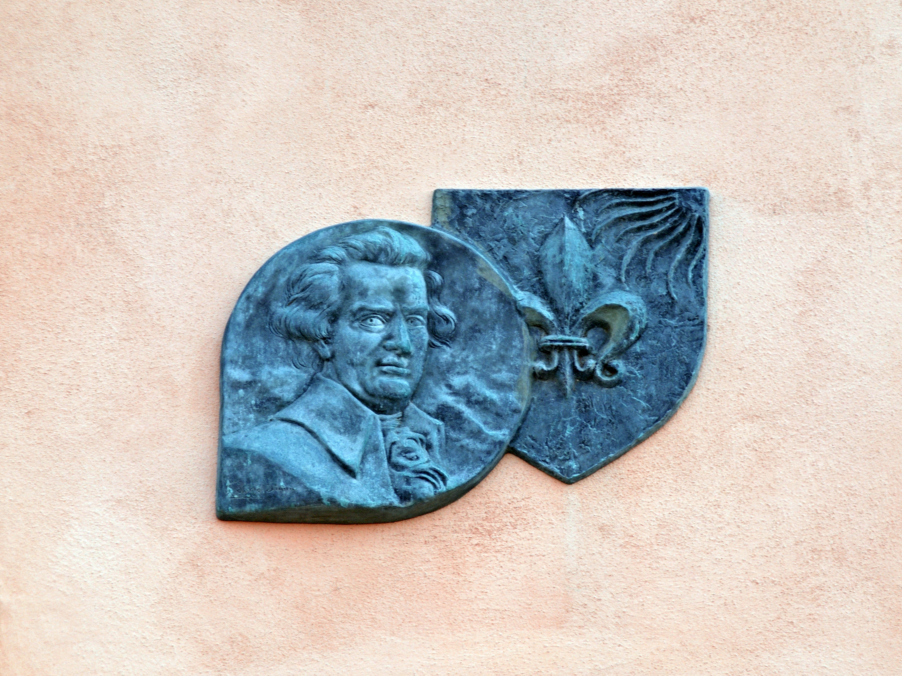 L'Île-Rousse, Balagne (Corse) - Effigie de Pascal Paoli sur la façade principale de la Mairie